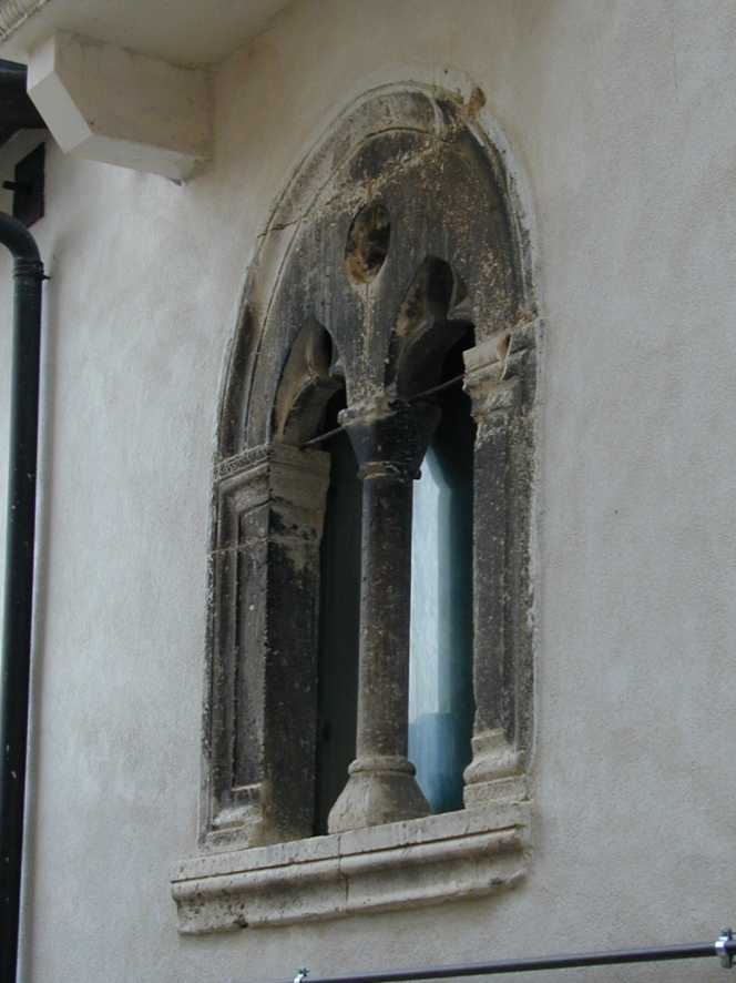 Castel di Ieri, Bifora in via Simonetto